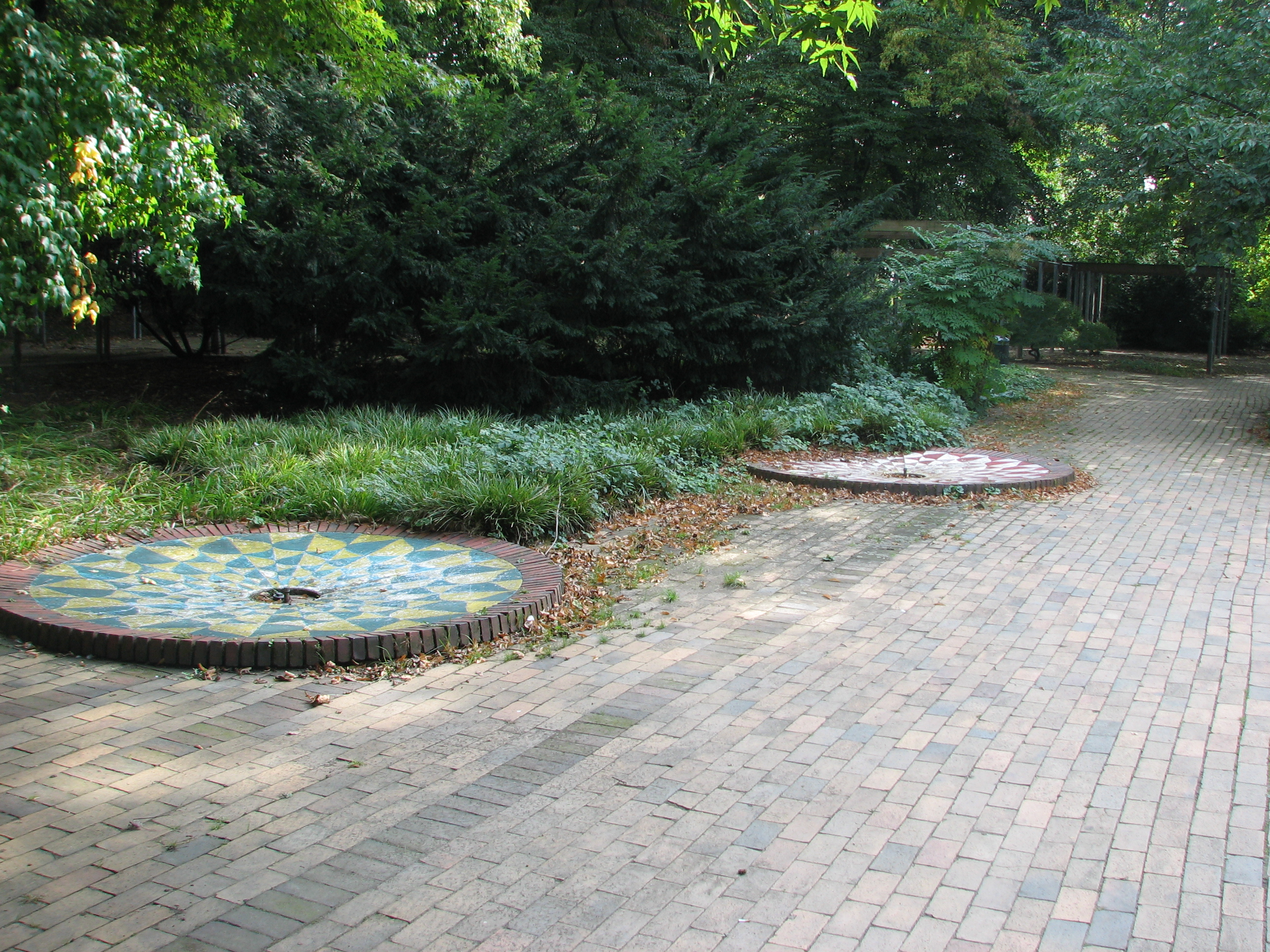 Brunnengarten im Kölner Rheinpark, entworfen von Günther Schulze